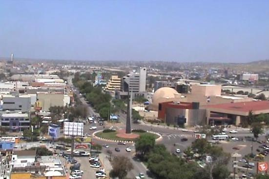 Glories Independencia